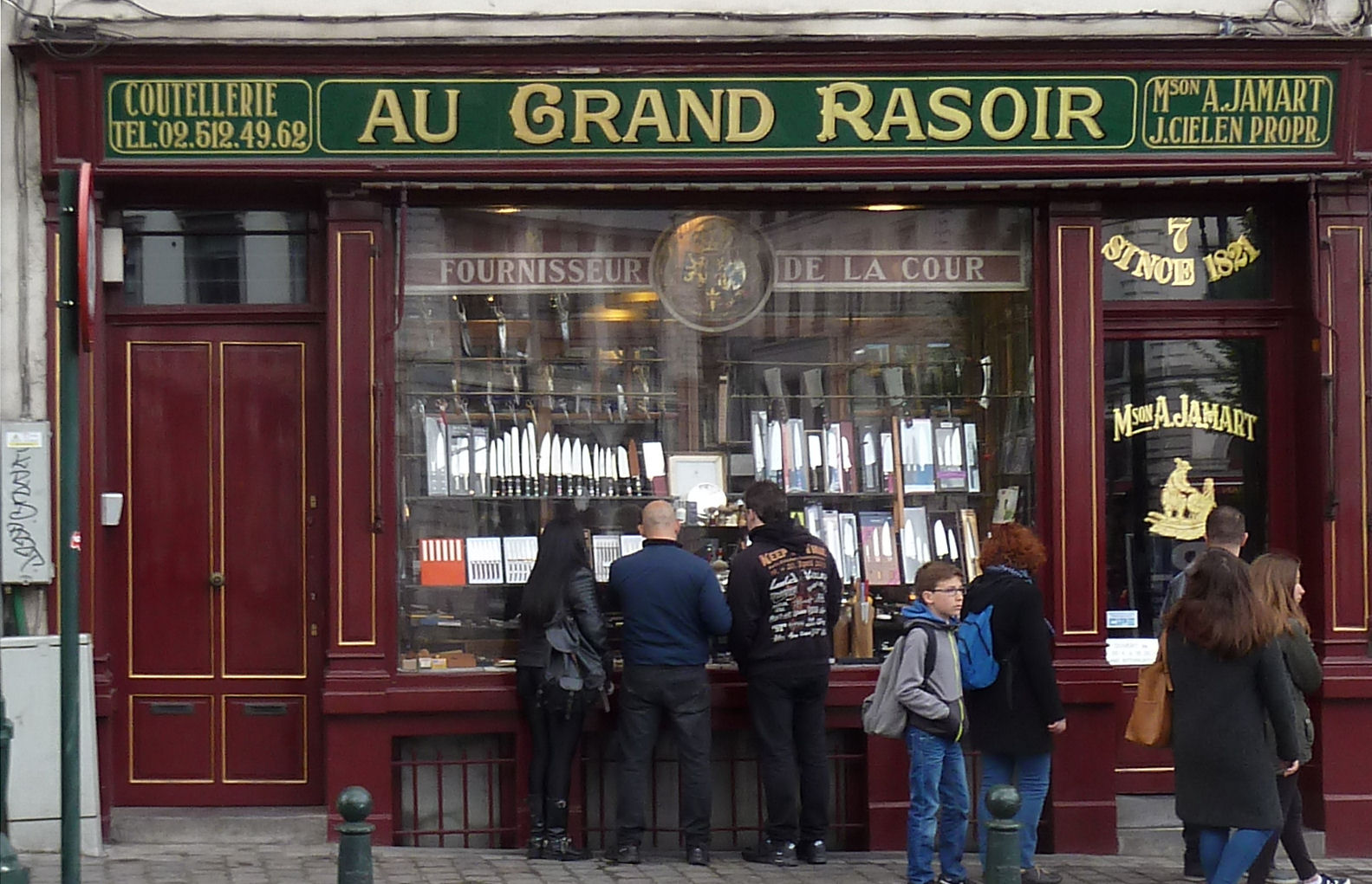 Hofleverancier